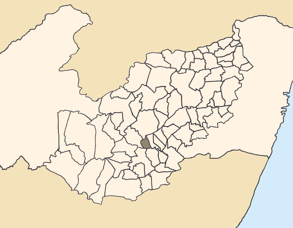 Mapa da mesorregião Agreste de Pernambuco (Brasil) subdivida em municípios. Em destaque, o município de Jucati. Map of the brazilian state of Pernambuco (mesorregião Agreste) showing the city of Jucati. Imagem tratada com o GIMP. Image made with GIMP.